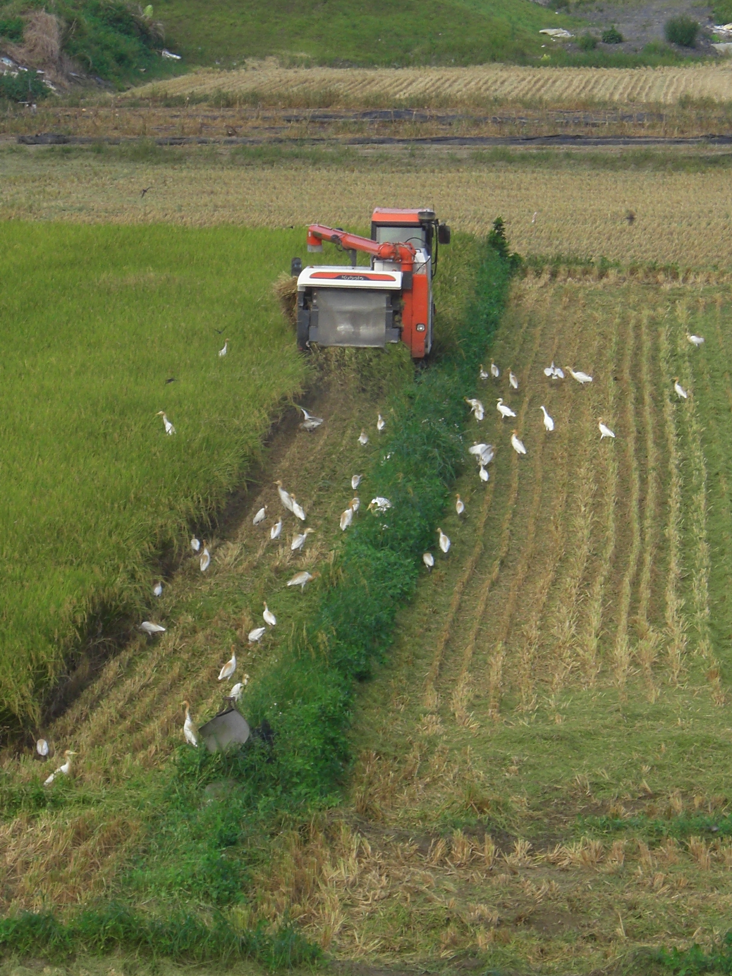 牛背鹭 Bubulcus coromandus 稻米收割時期，白鷺鷥跟在收割機後，從排出的草渣中捕食小蟲。